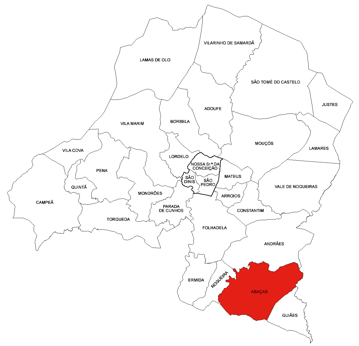 Freguesia de Abaças (concelho de Vila Real)